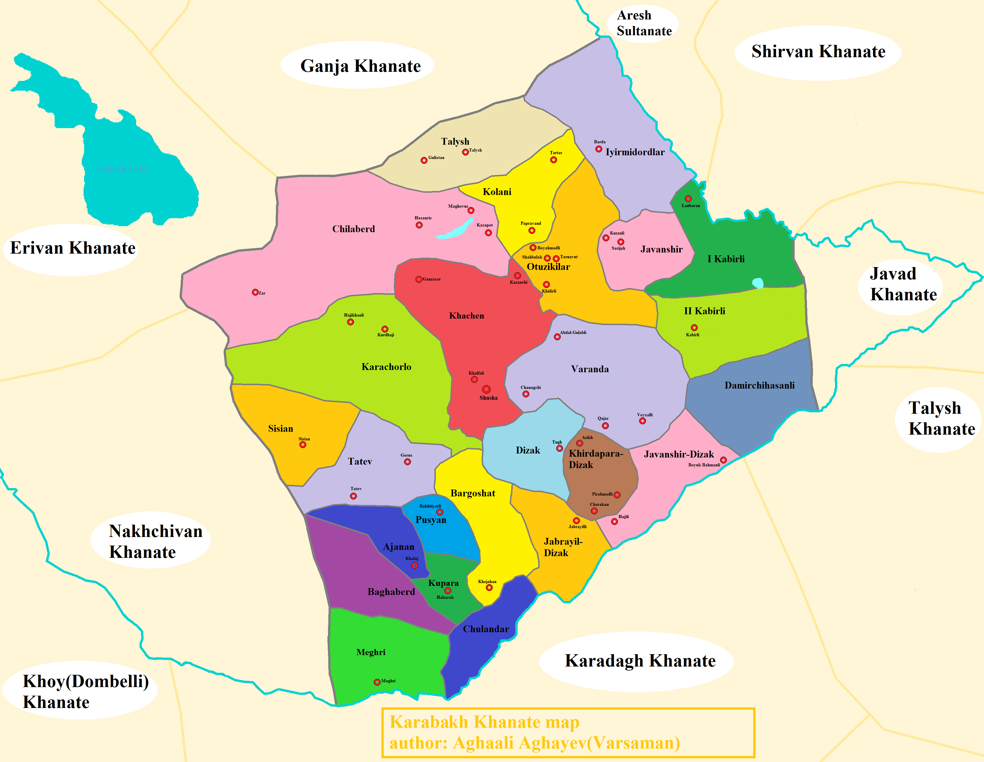 Карабахское ханство и его махалы